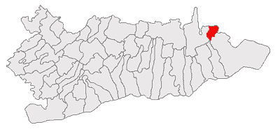 Categorie:Hărţi ale judeţului Călăraşi